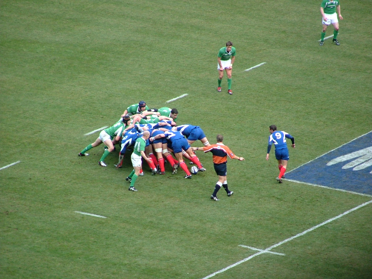 Le XV de France de rugby lors de France-Irlande du tournoi des six nations 2006 au Stade de France